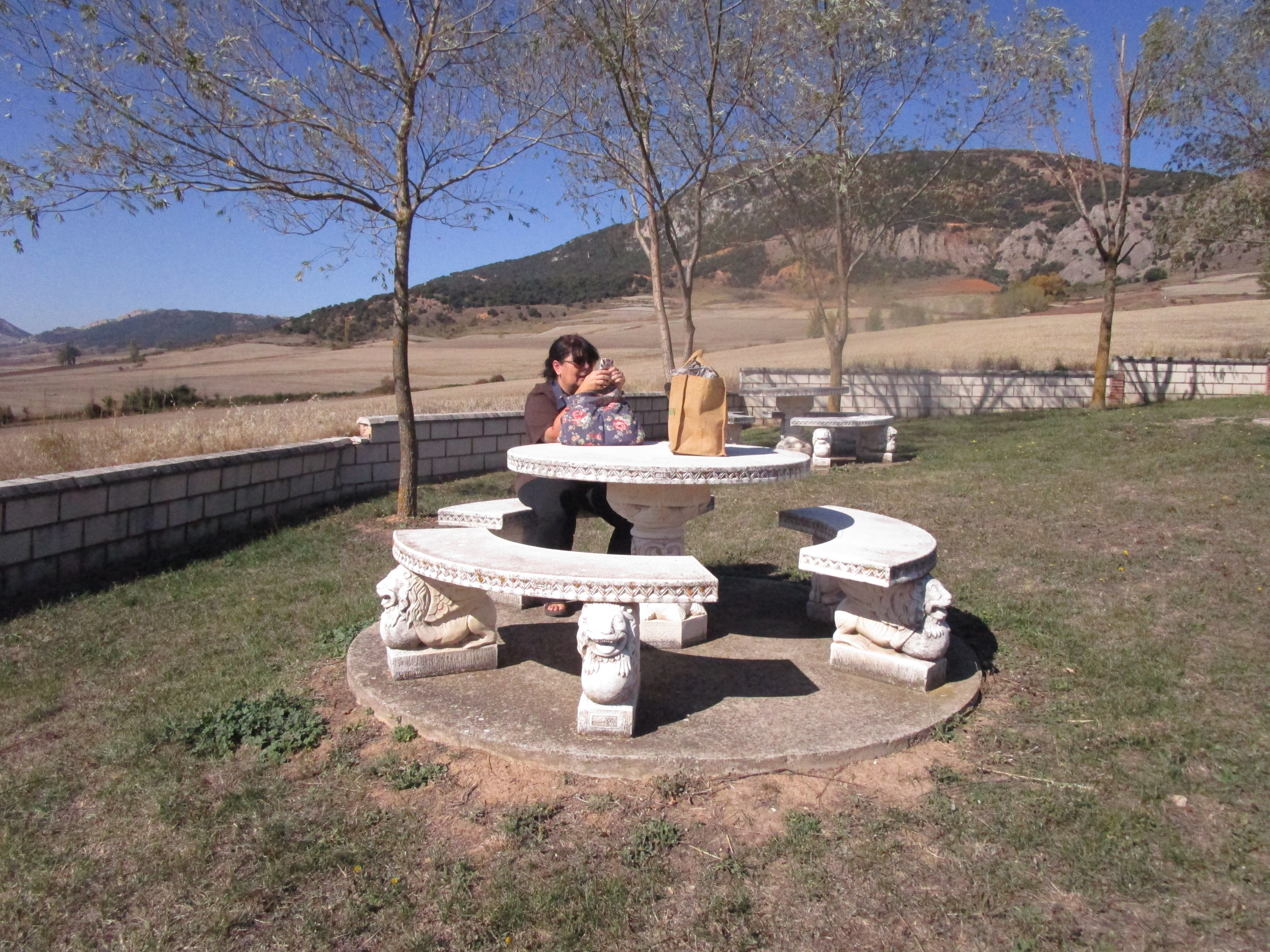 Merenderos labrados en Miraveche (Burgos).